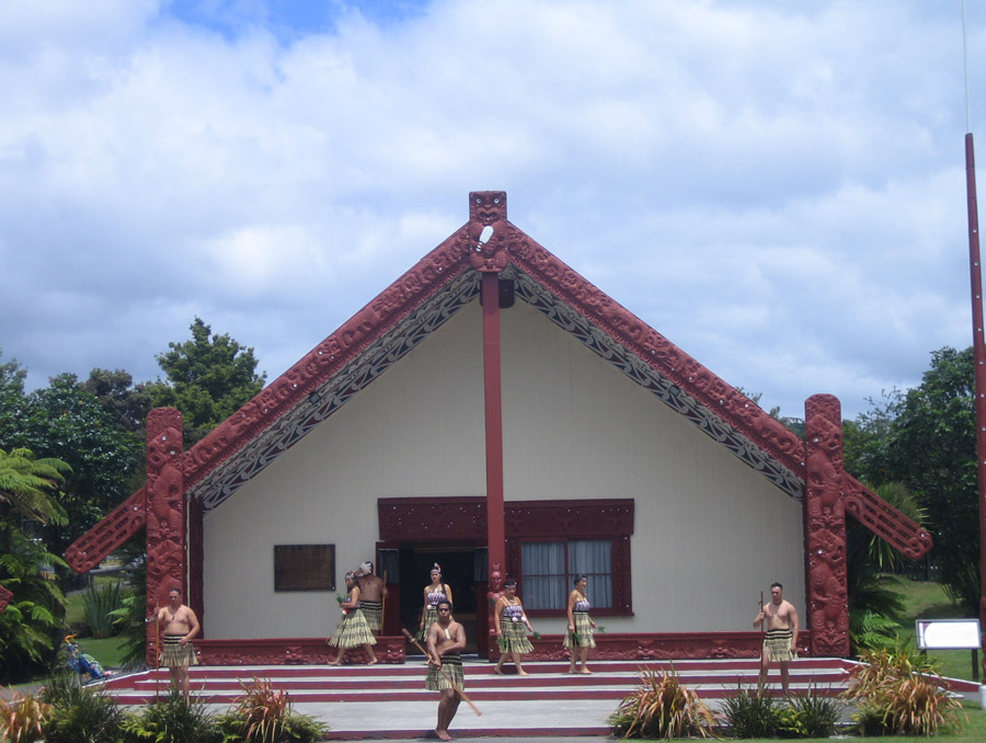 Photo du Centre Te Puia, proche de Rotorua